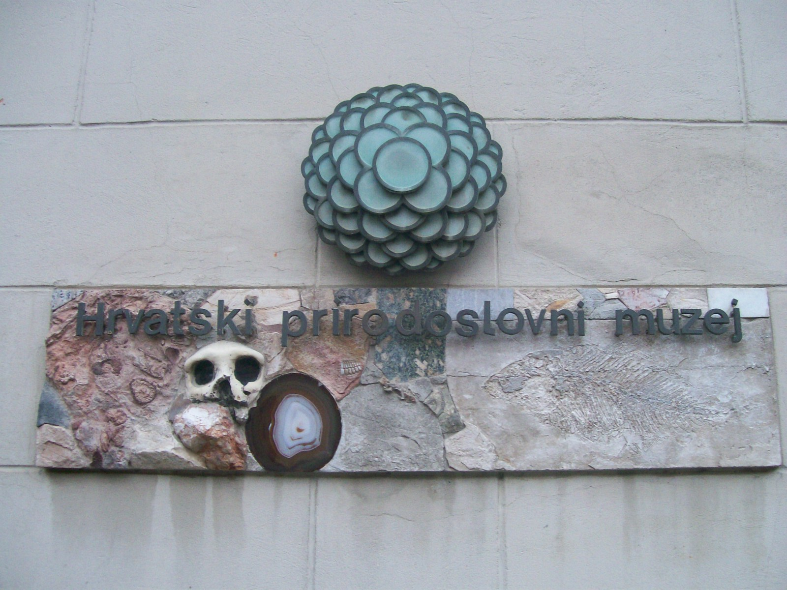 Hrvatski prirodoslovni muzej Zagreb